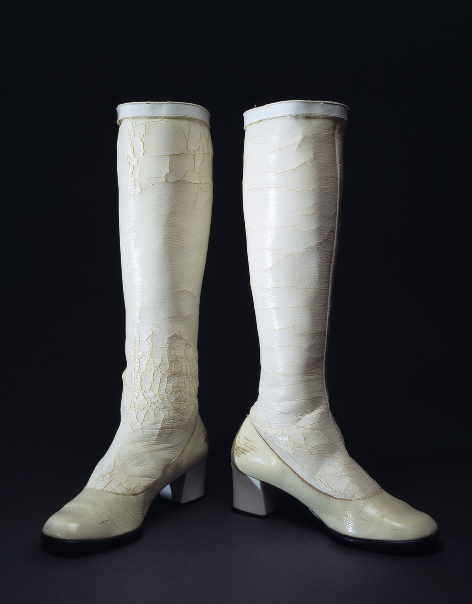 Höga, vita damstövlar, 1970-tal. Nordiska museets föremål inv.nr 311084.